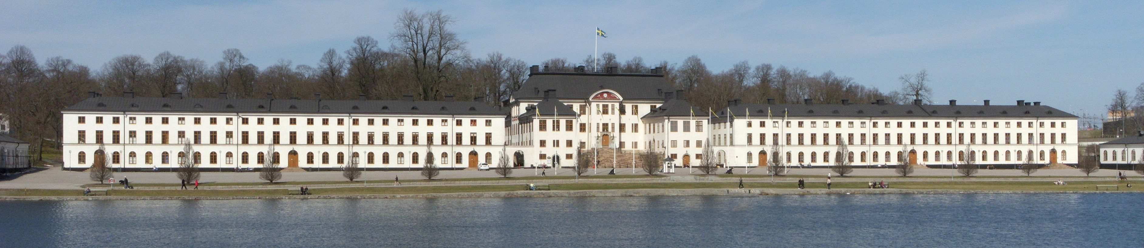 Karbergs slott